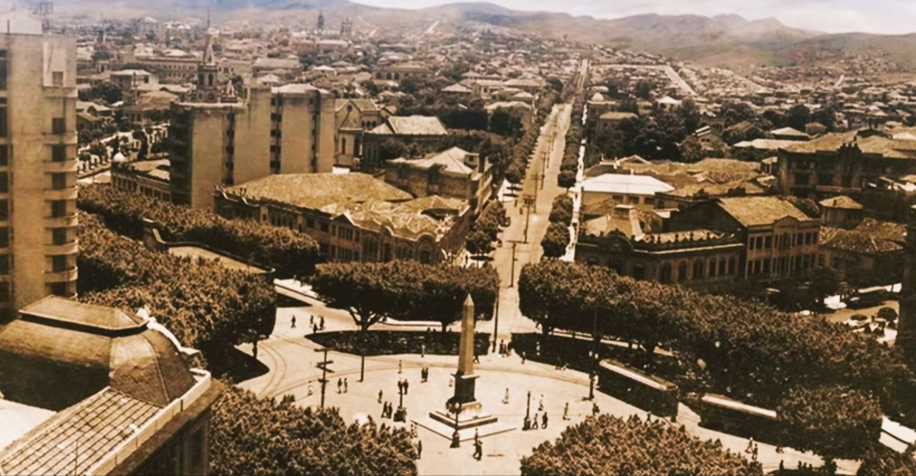 Praça da Savassi, atual praça sete de setembro